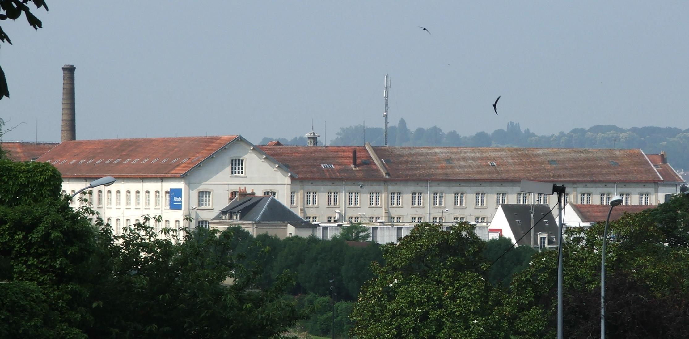 L'ancienne Manufacture de Tabac au Mans, dans le quartier de Saint-Georges, aujourd'hui utilisée par le groupe Altadis.